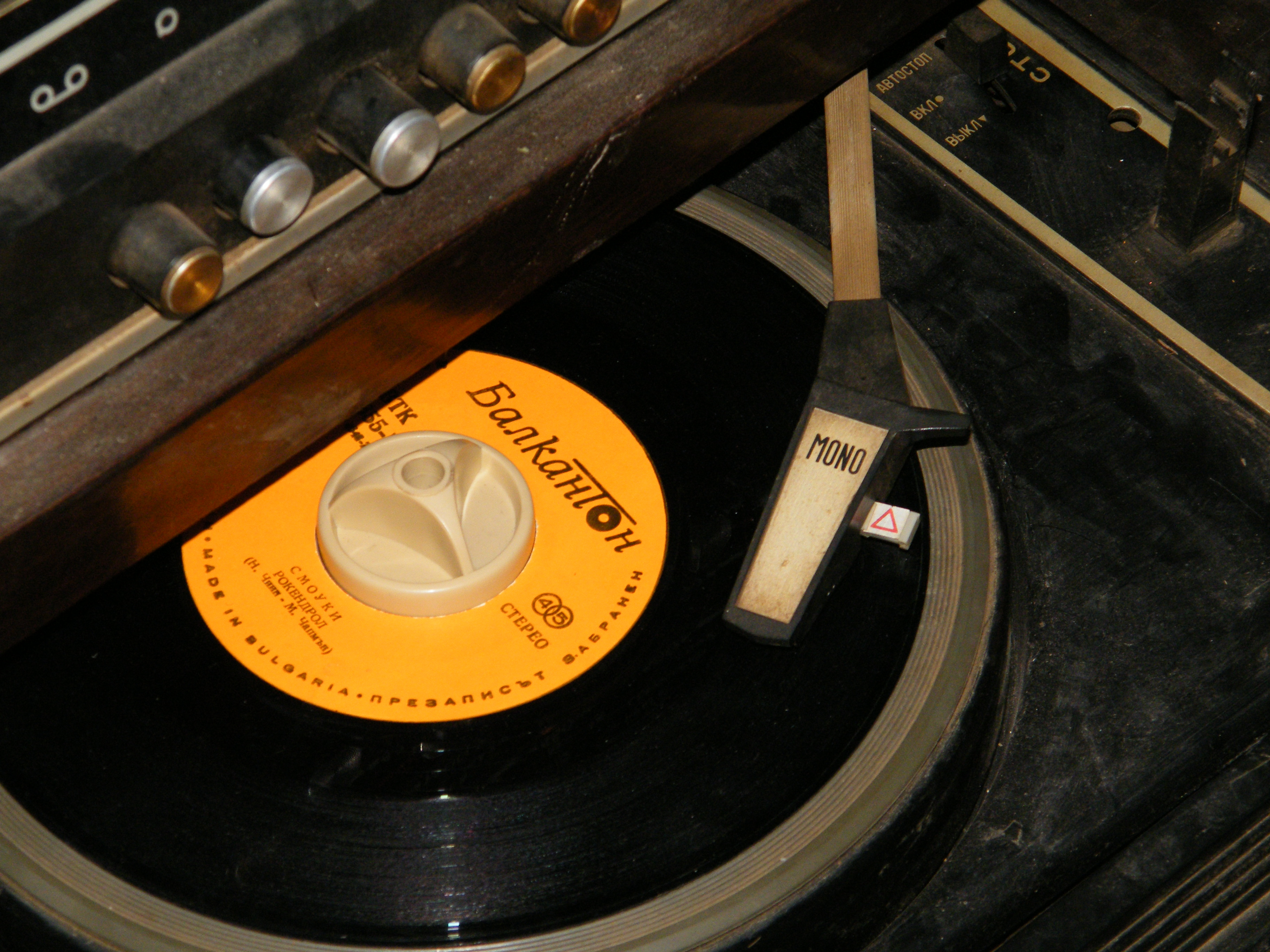 Теплый ламповый звук